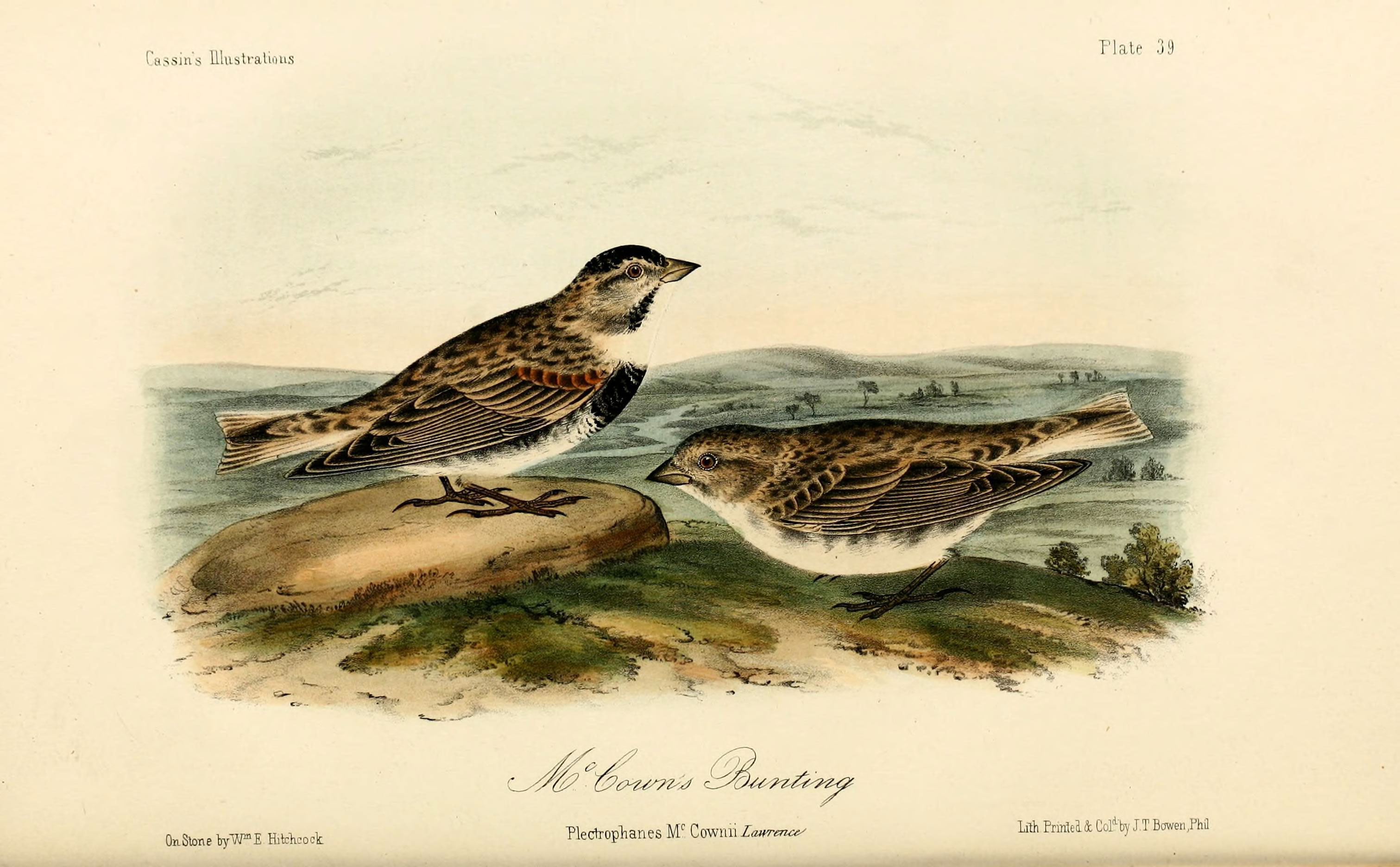 c !?